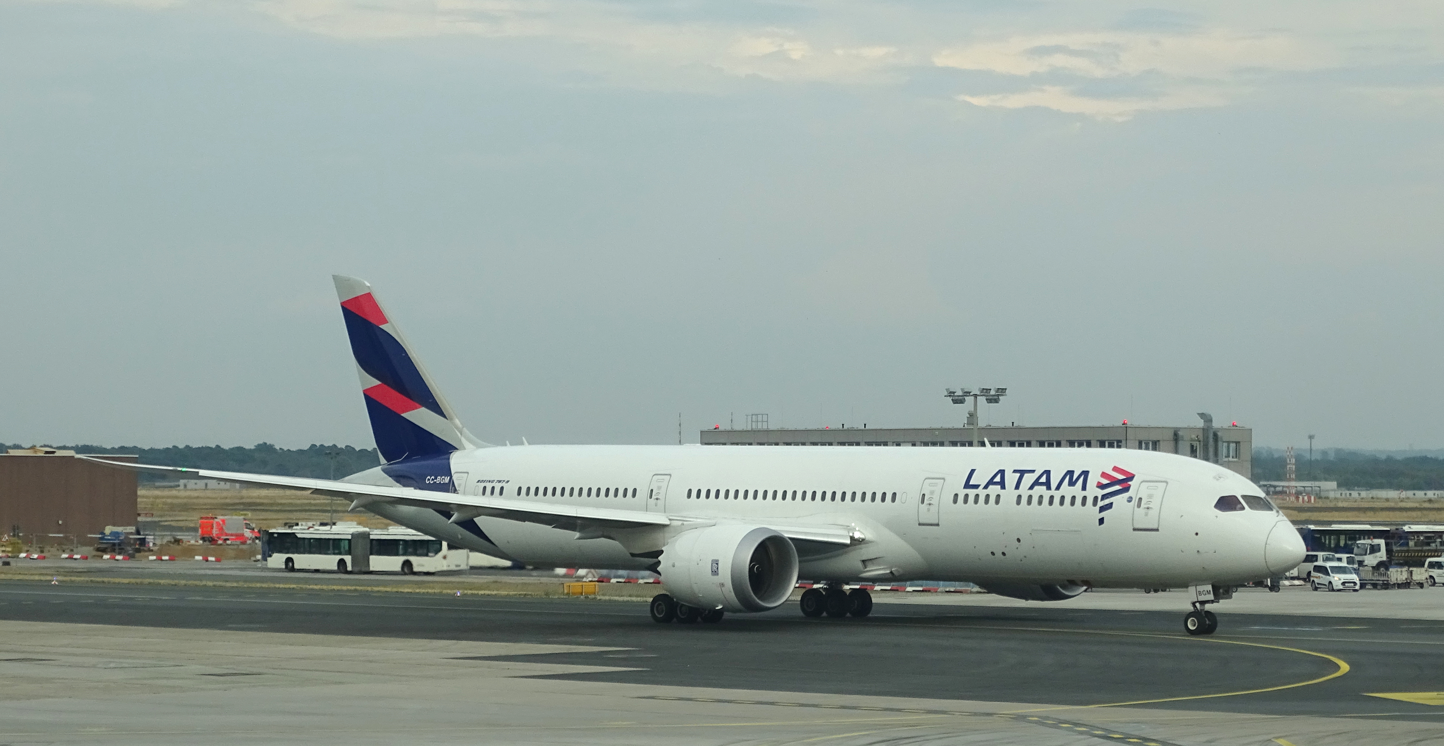 LATAM Airlines Boeing 787-9 Dreamliner CC-BGM( s/n 38771) op de luchthaven Frankfurt am Main, Duitsland.